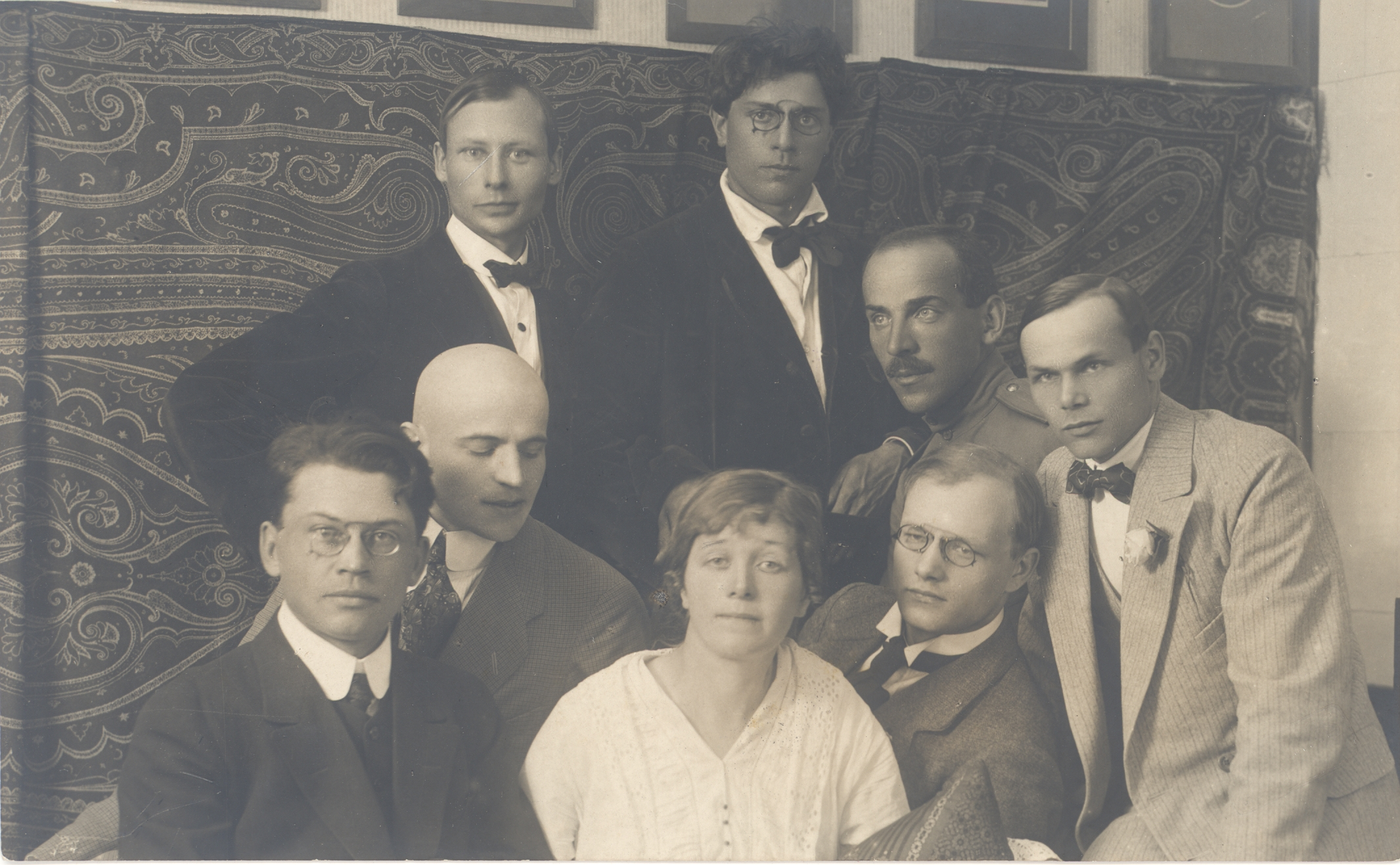 "Siuru". Ülemises reas seisavad vasakult: kunstnikud 1) Peet Aren, 2) Otto Krusten Alumises reas istuvad vasakult: 1) Friedebert Tuglas, 2) Arthur Adson, 3) Marie Under, 4) August Gailit, 5) Johannes Semper ja 6) Henrik Visnapuu